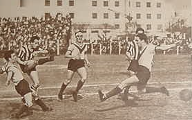 Imagen del partido entre Vélez Sarsfield y Rosario Central disputado el 12 de septiembre de 1942; se ve a Ángel De Cicco (RC) rematando.